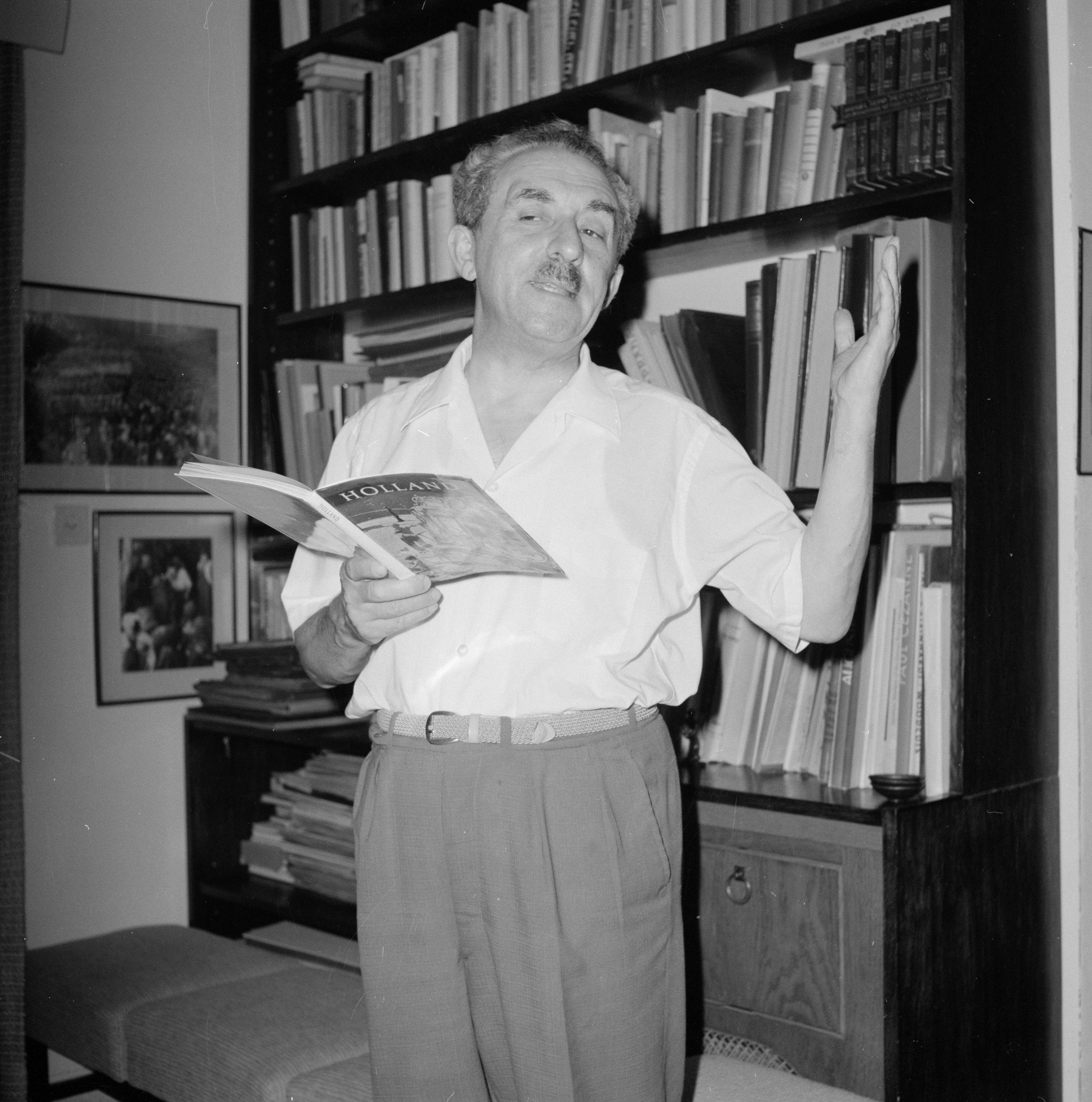 Collectie / Archief : Fotocollectie Van de Poll Reportage / Serie : [ onbekend ] Beschrijving : Moshe Sharett, voorzitter van de Jewish Agency, met in zijn hand een boek over Holland Datum : 1 januari 1960 Locatie : Israël Persoonsnaam : Sharet, Moshe Fotograaf : Poll, Willem van de, [onbekend] Auteursrechthebbende : Nationaal Archief Materiaalsoort : Negatief (zwart/wit) Nummer archiefinventaris : bekijk toegang 2.24.14.02 Bestanddeelnummer : 255-4721